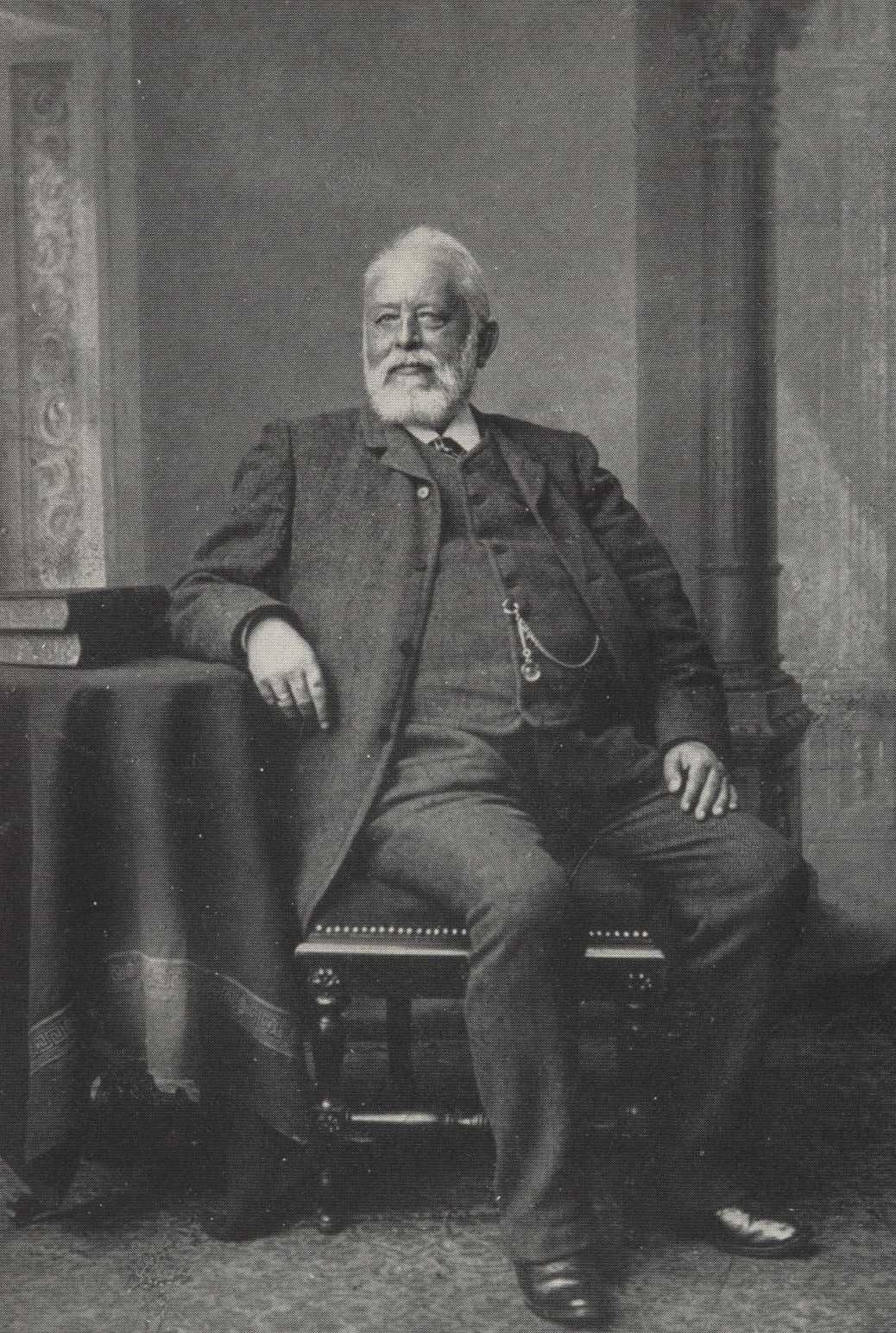 Fotografie von Karl Anton Theodor Rethwisch